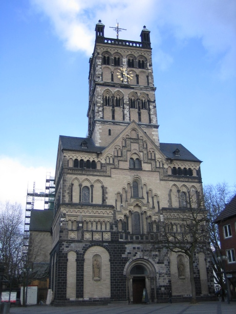 Fassade des Quirinusmünsters in Neuss